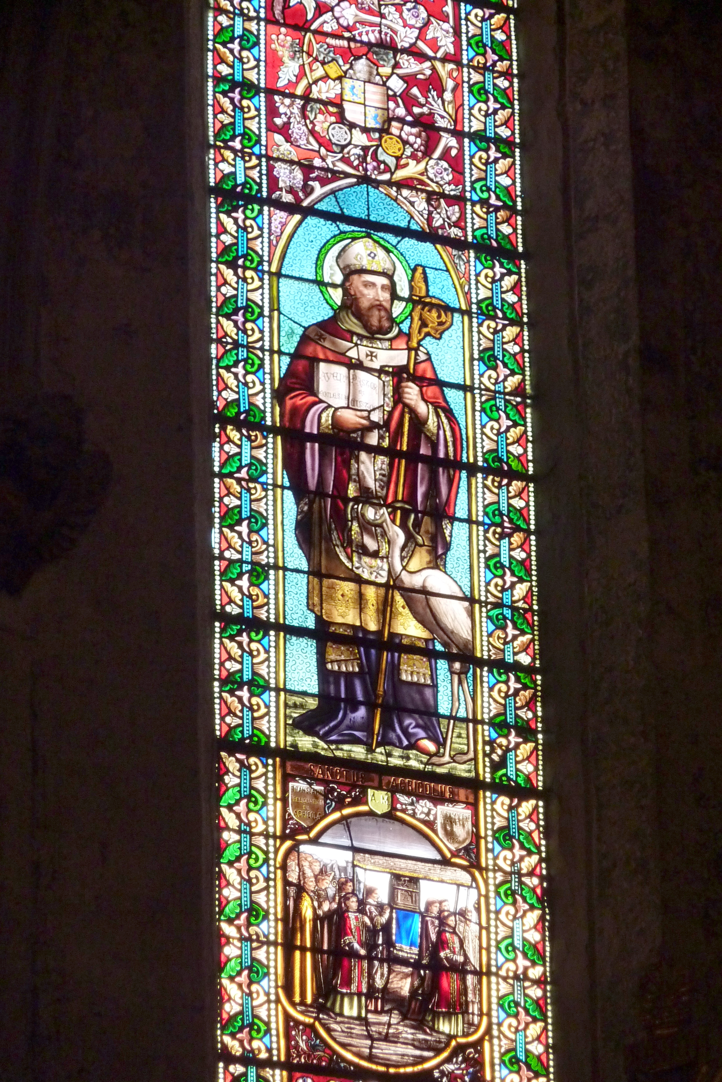 Bleiglasfenster in der Kirche Saint Agricol Avignon, Darstellung: hl. Agricolus (Agricola von Bologna ?)